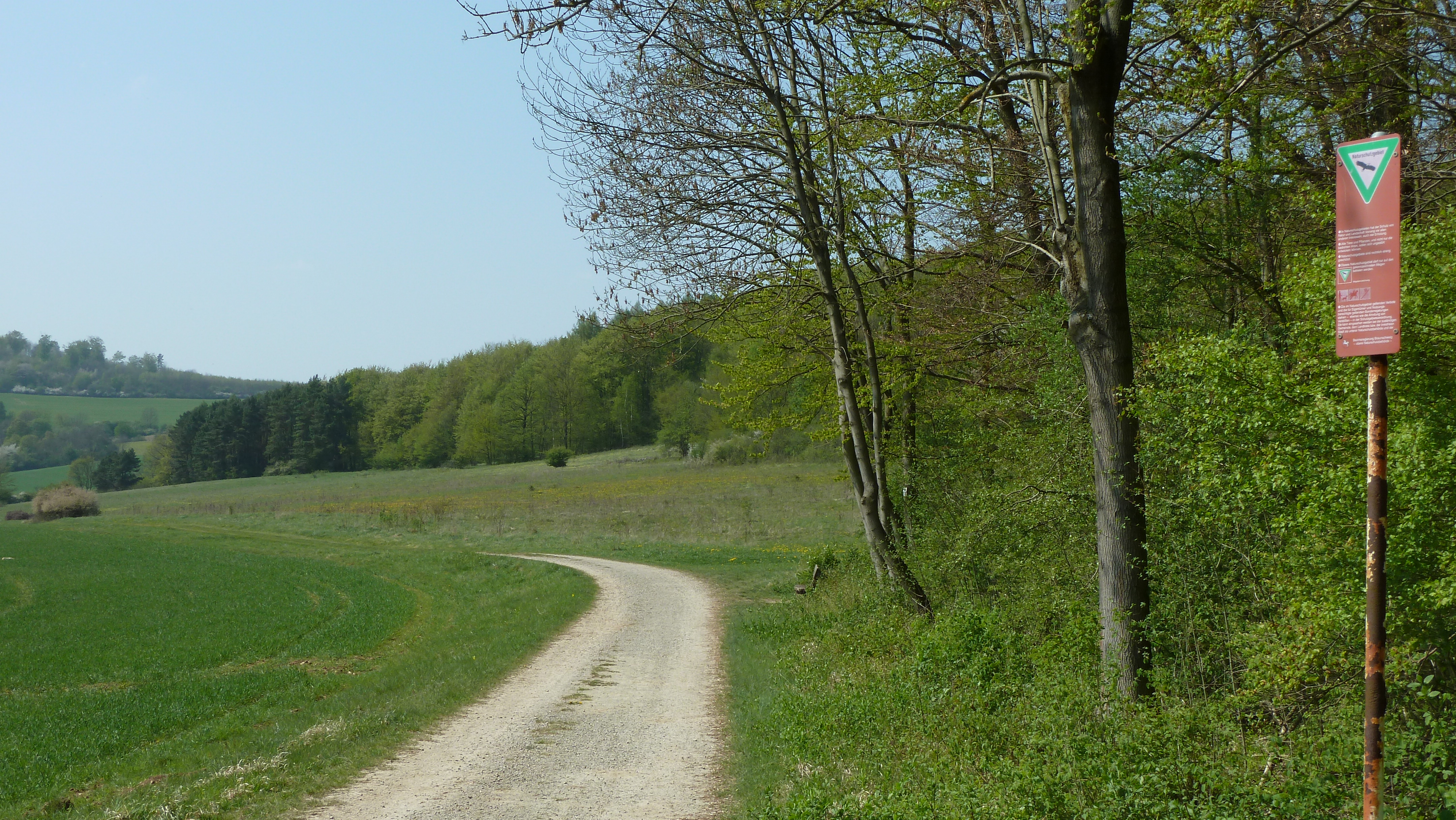 Weg im Bratental; rechts des Weges der nördlichste Teil des Naturschutzgebietes Bratental mit Halbtrockenrasen und Wald. Blick nach Westnordwesten.